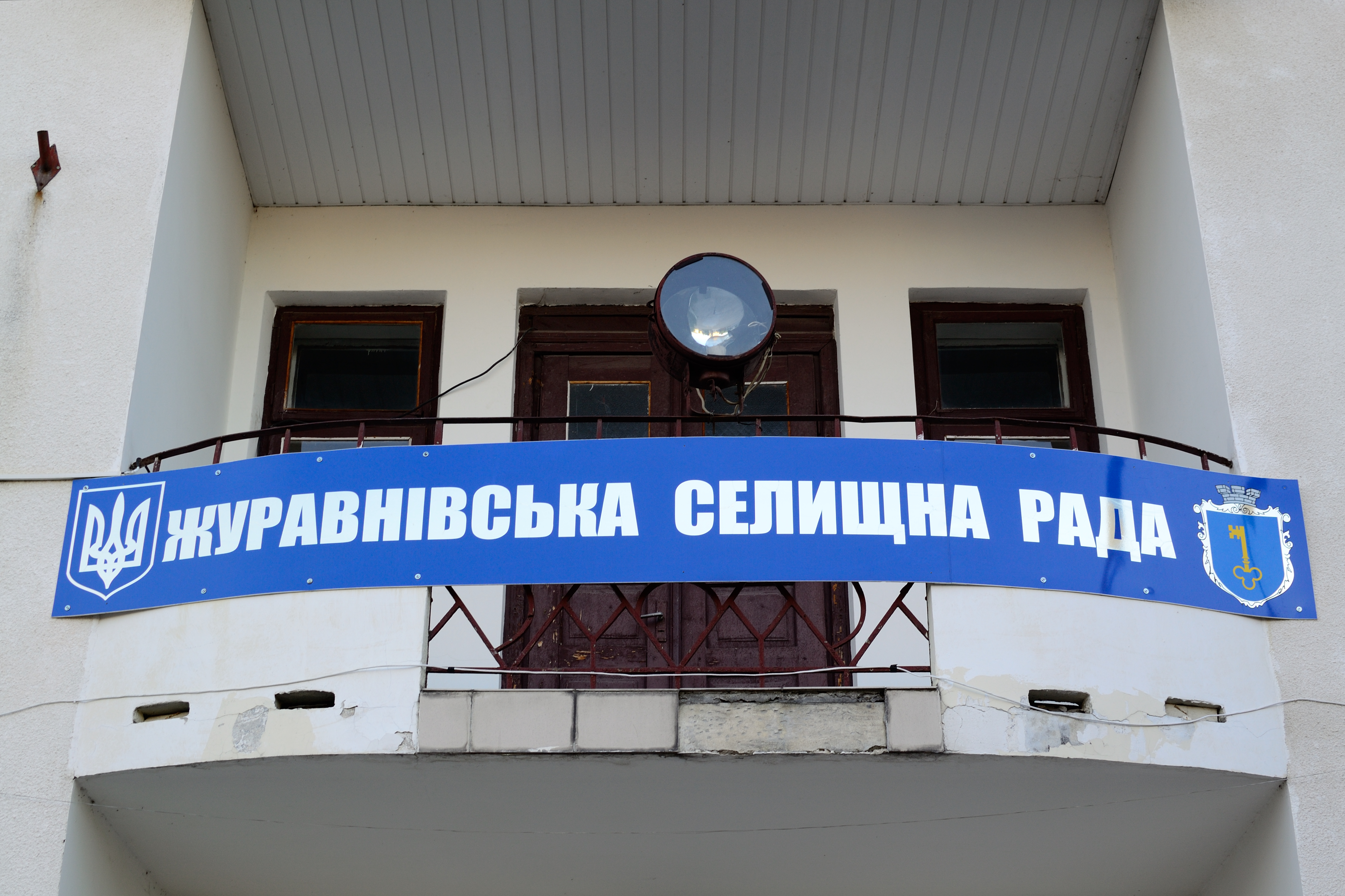 Журавнівська селищна рада